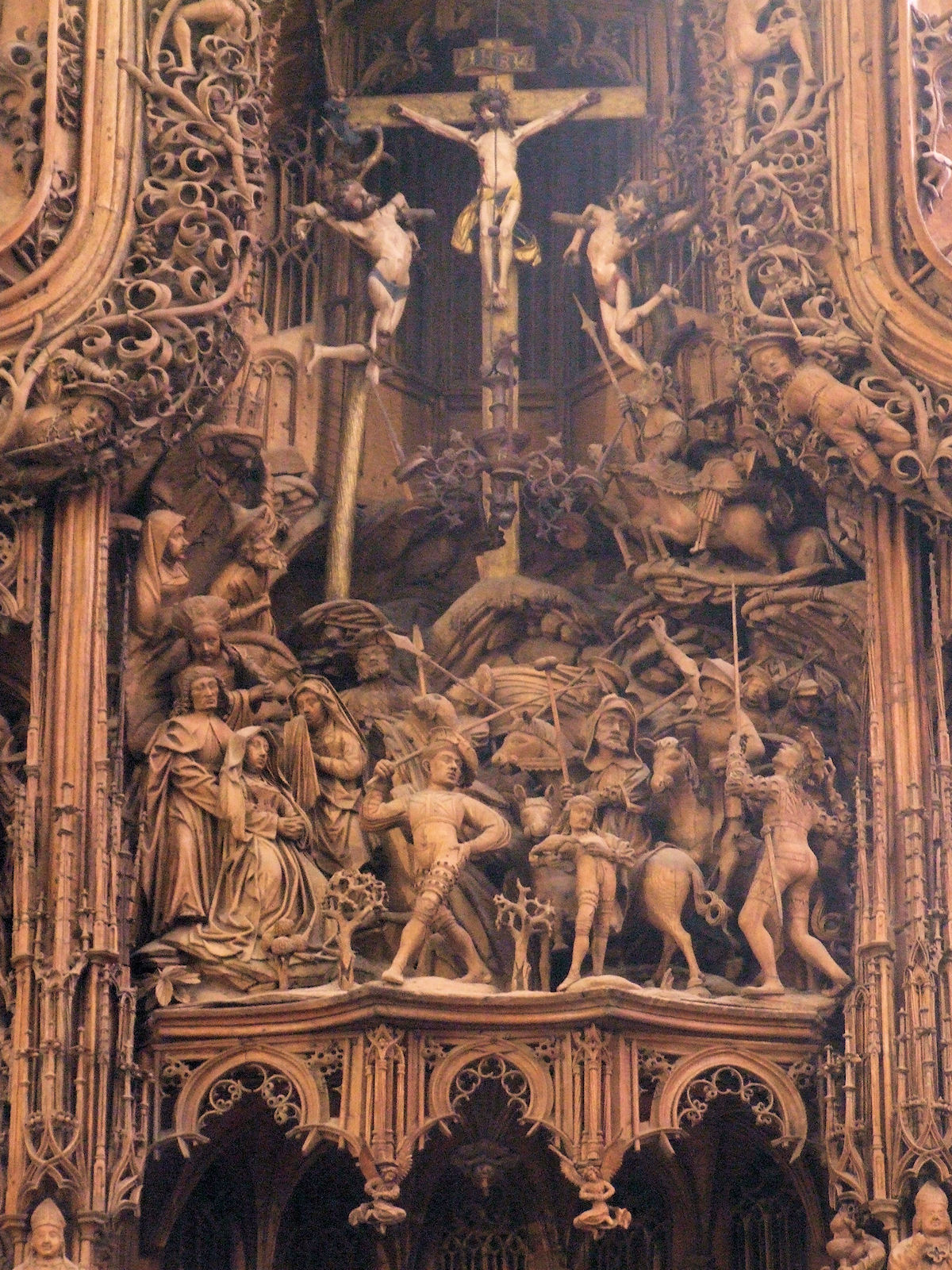 Sieben-Schmerzen-Altar. Sankt Nicolai, Kalkar, Nordrhein-Westfalen Altar of the Seven Sorrows - Detail. Church of Saint Nicholas, Kalkar, in North Rhine-Westphalia, Germany